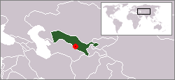 Bukhara